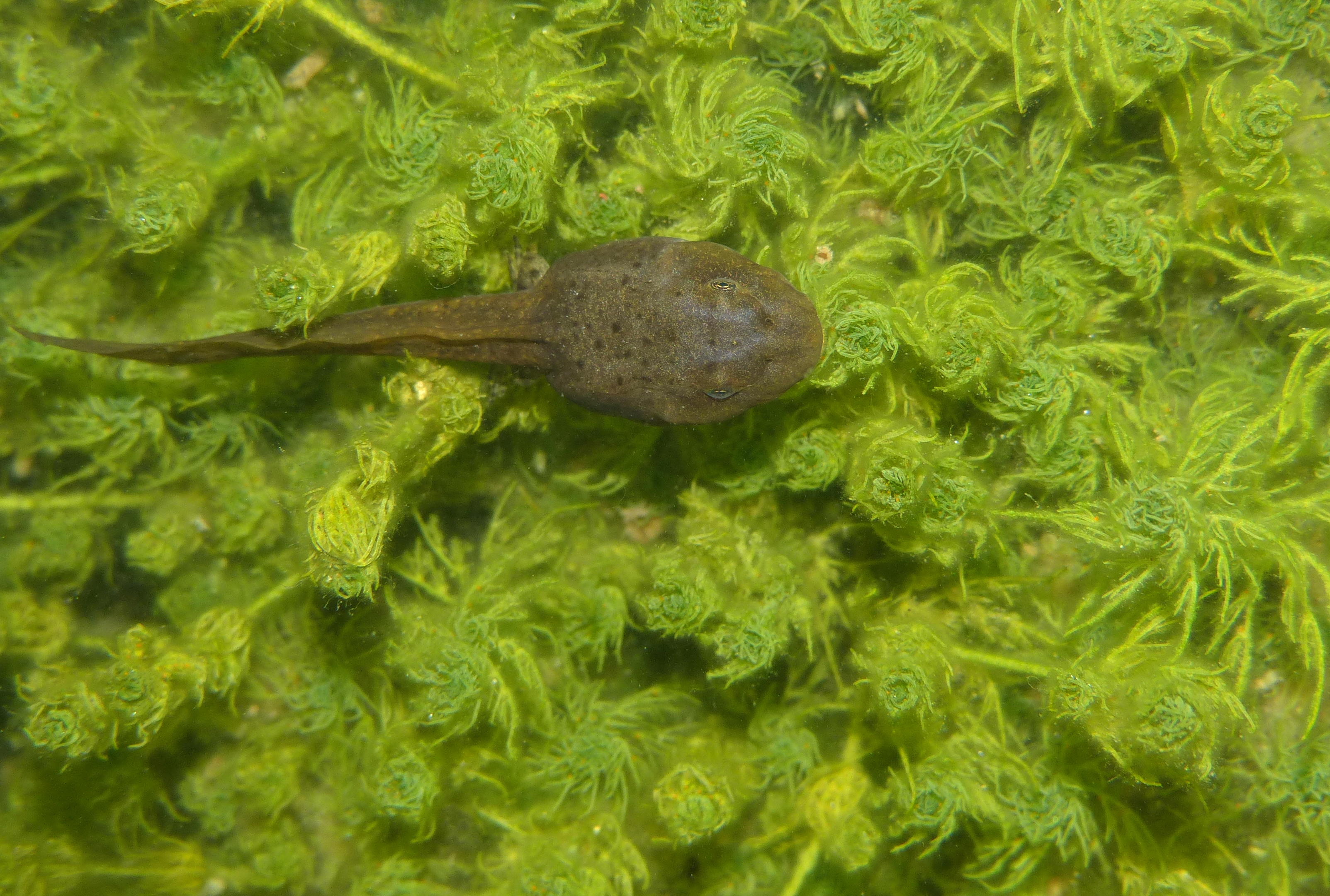 Cavandi, Panes, Peñamellera Baja, Asturias, Spain